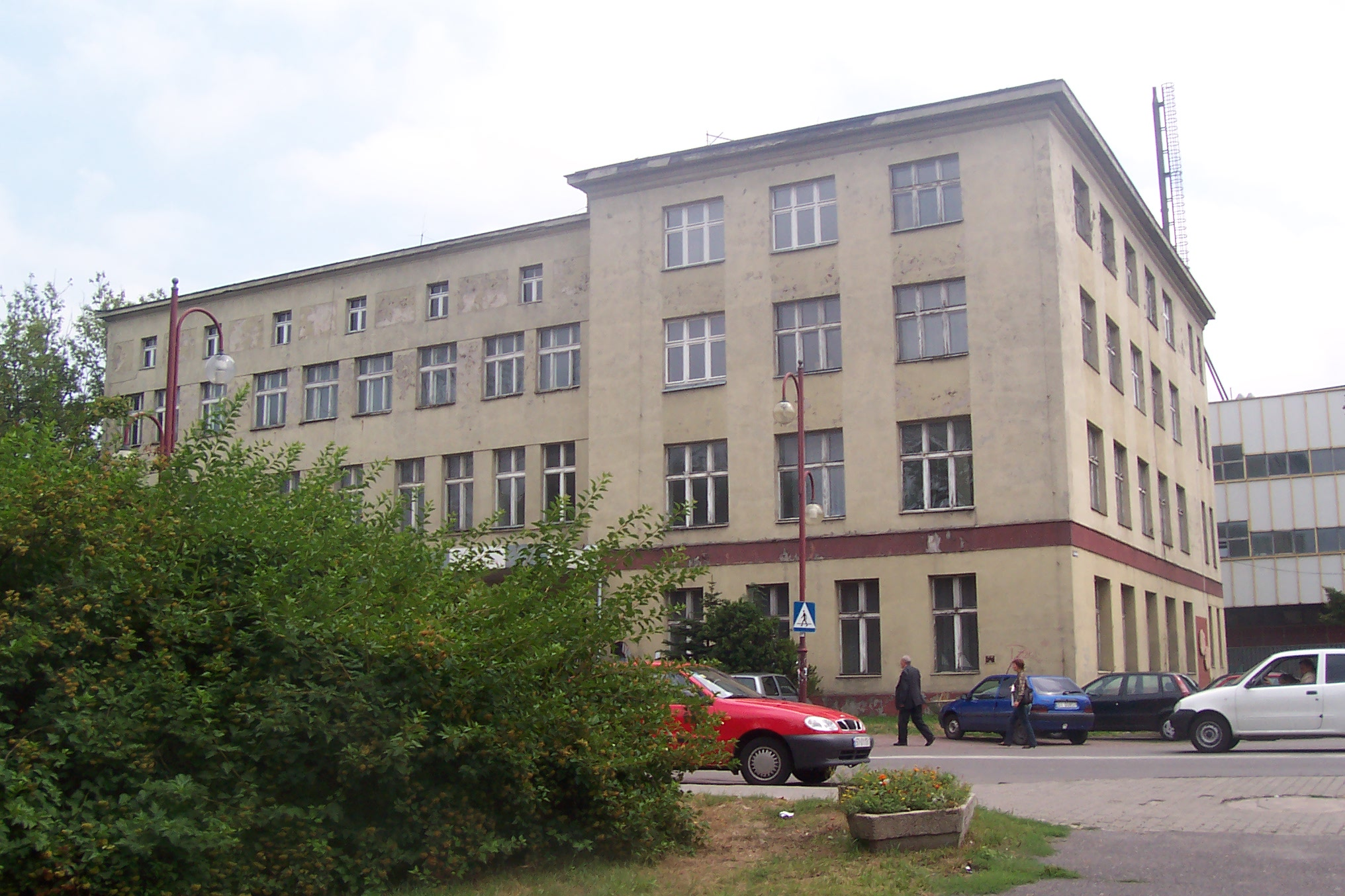 Budynek dyrekcji huty jedność (obecnie nieczynny)